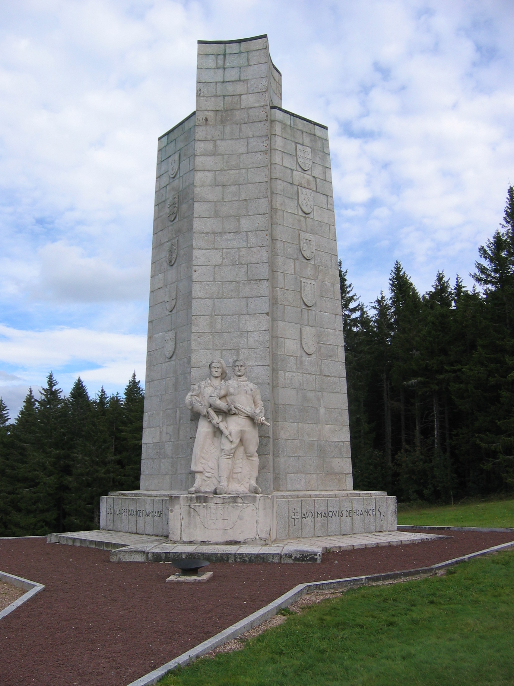 Monument de la résistance sur le Mont Mouchet (Haute Loire, France)